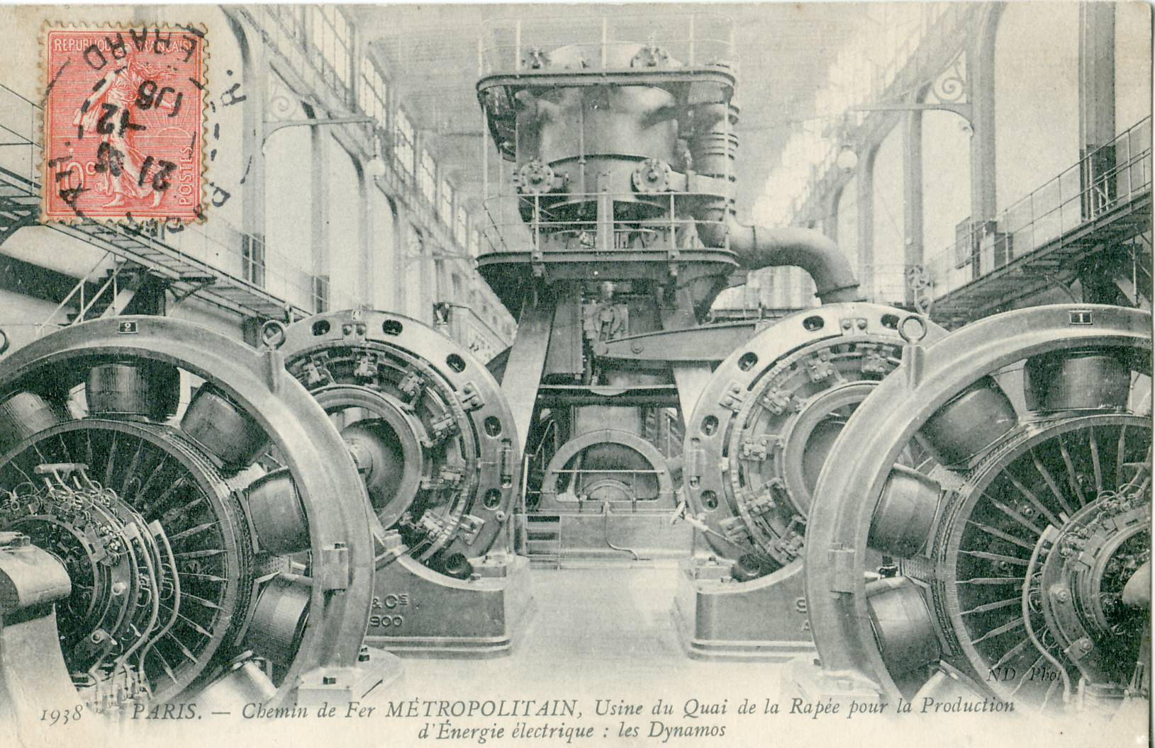 Carte postale ancienne éditée par ND N° 1938Paris : Chemin de fer Métropolitain, usine du Quai de la Rapée pour la production d'énergie électrique : les Dynamos